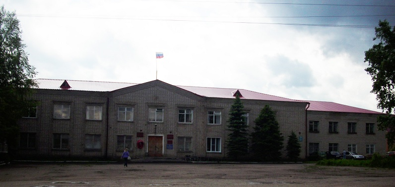 Здание администрации Шабалинского района в посёлке Ленинское